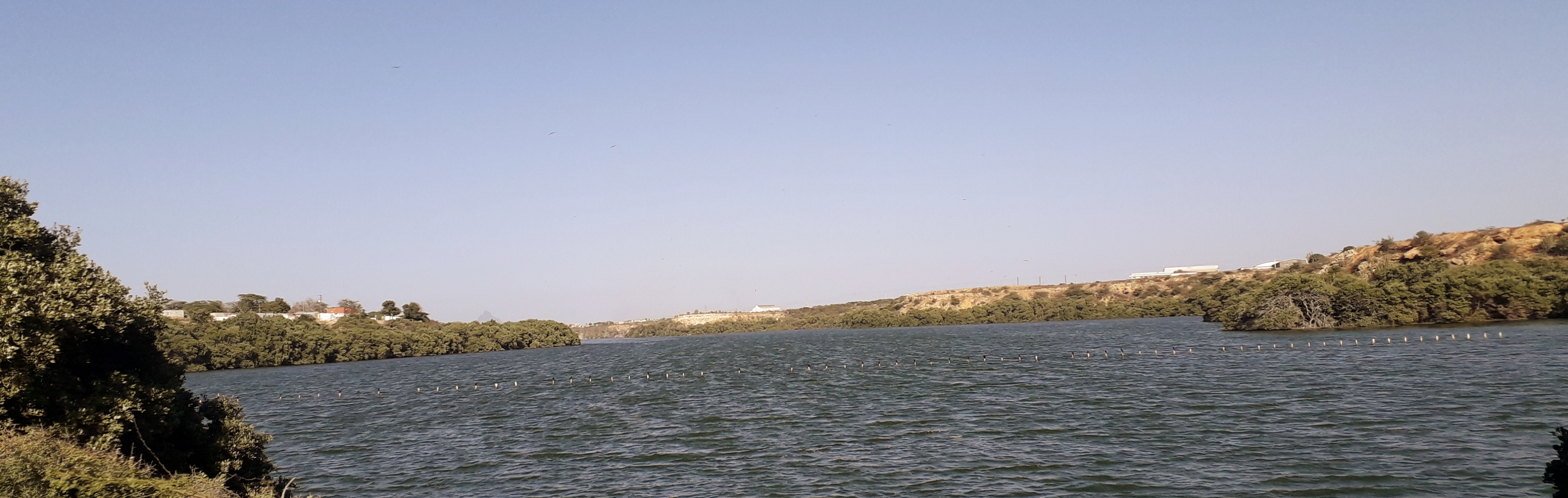 Parque metropolitano Laguna de Guaranao en Punto Fijo, Falcón - Venezuela.